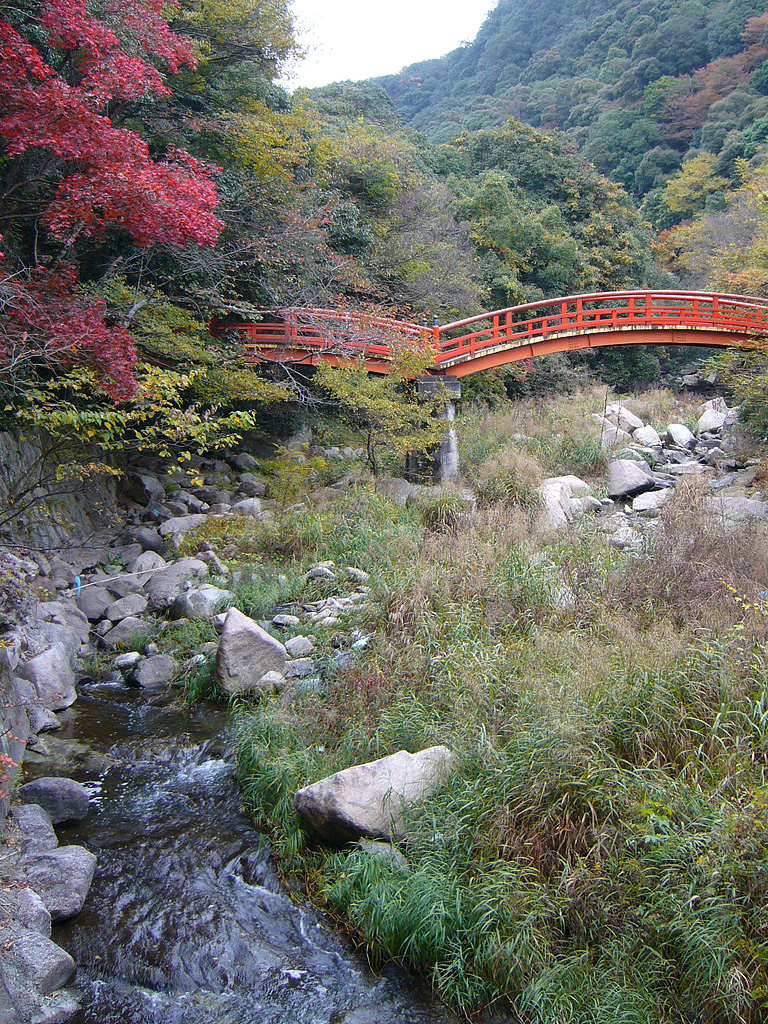 Taisanji in Kobe, Hyogo, Japan